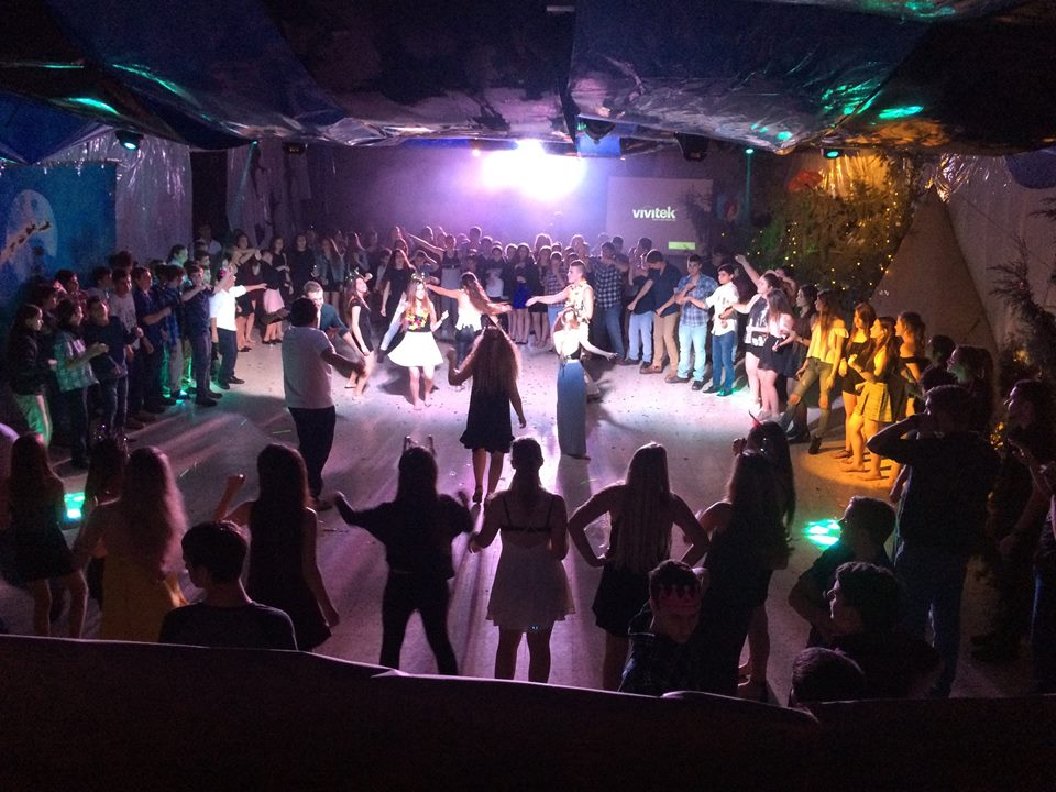 מסיבת ריקודים ביום שישי ברעות